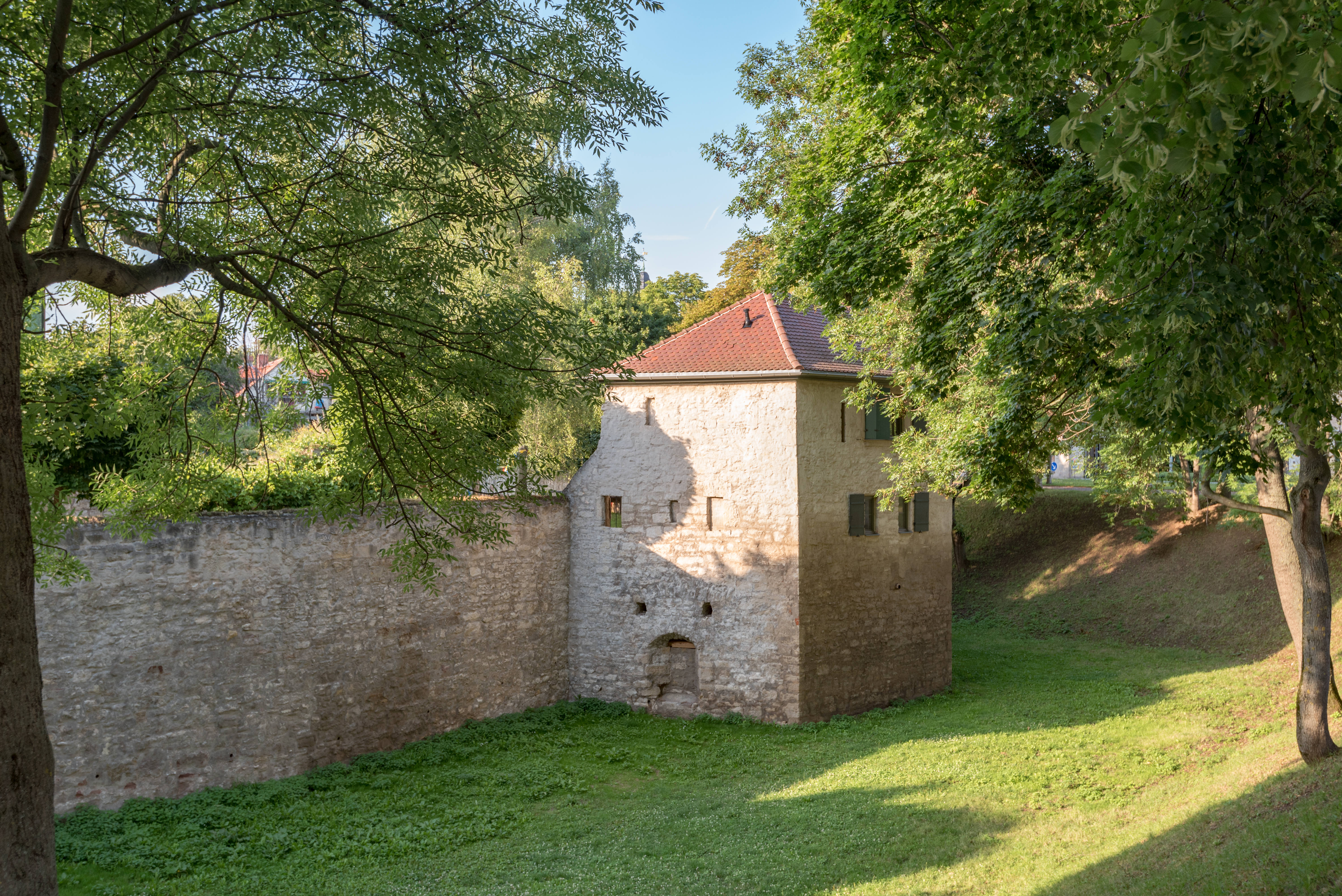 Naumburg (Saale), Stadtbefestigung, Südostecke, Jakobsring